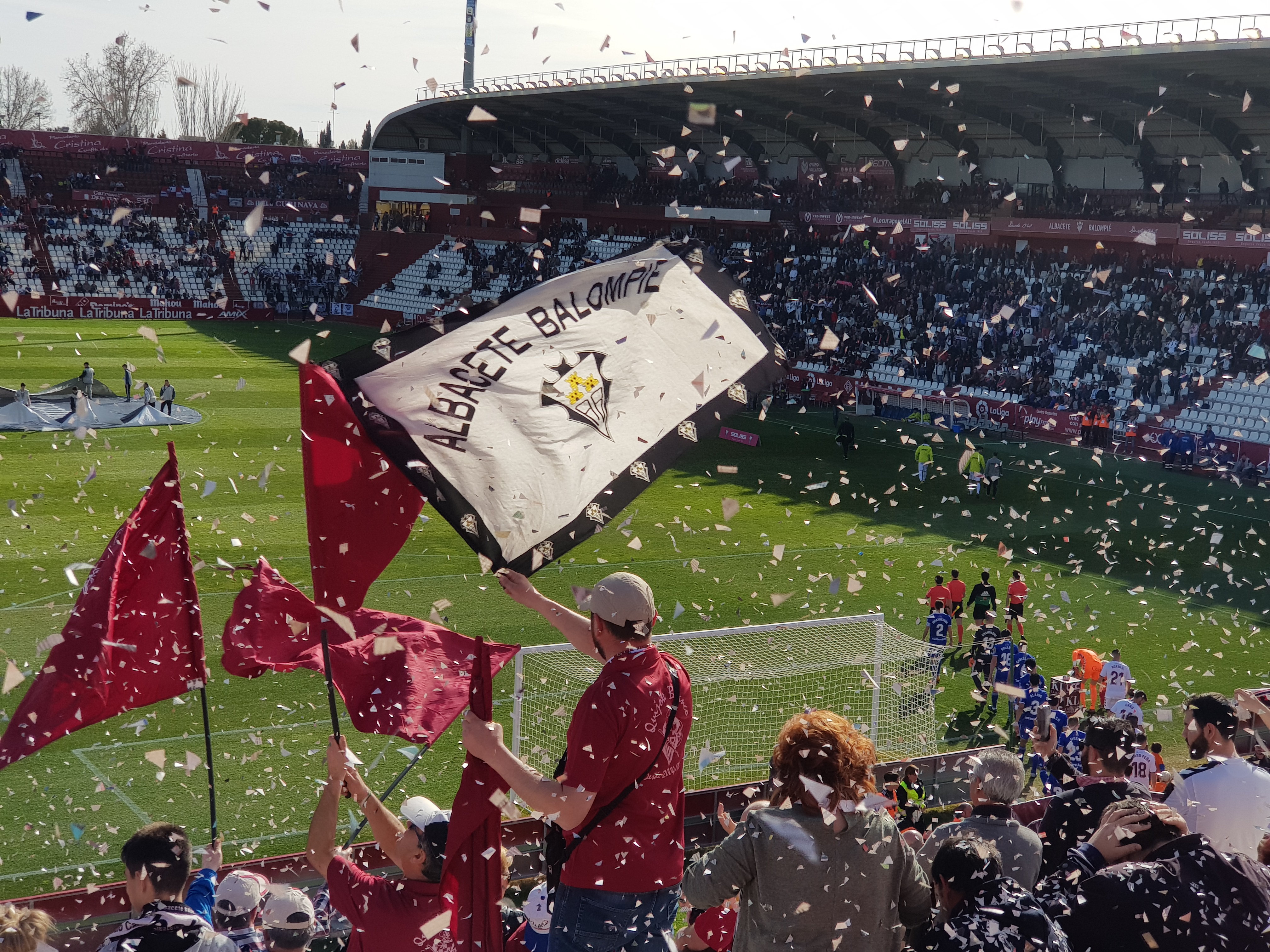 Afición